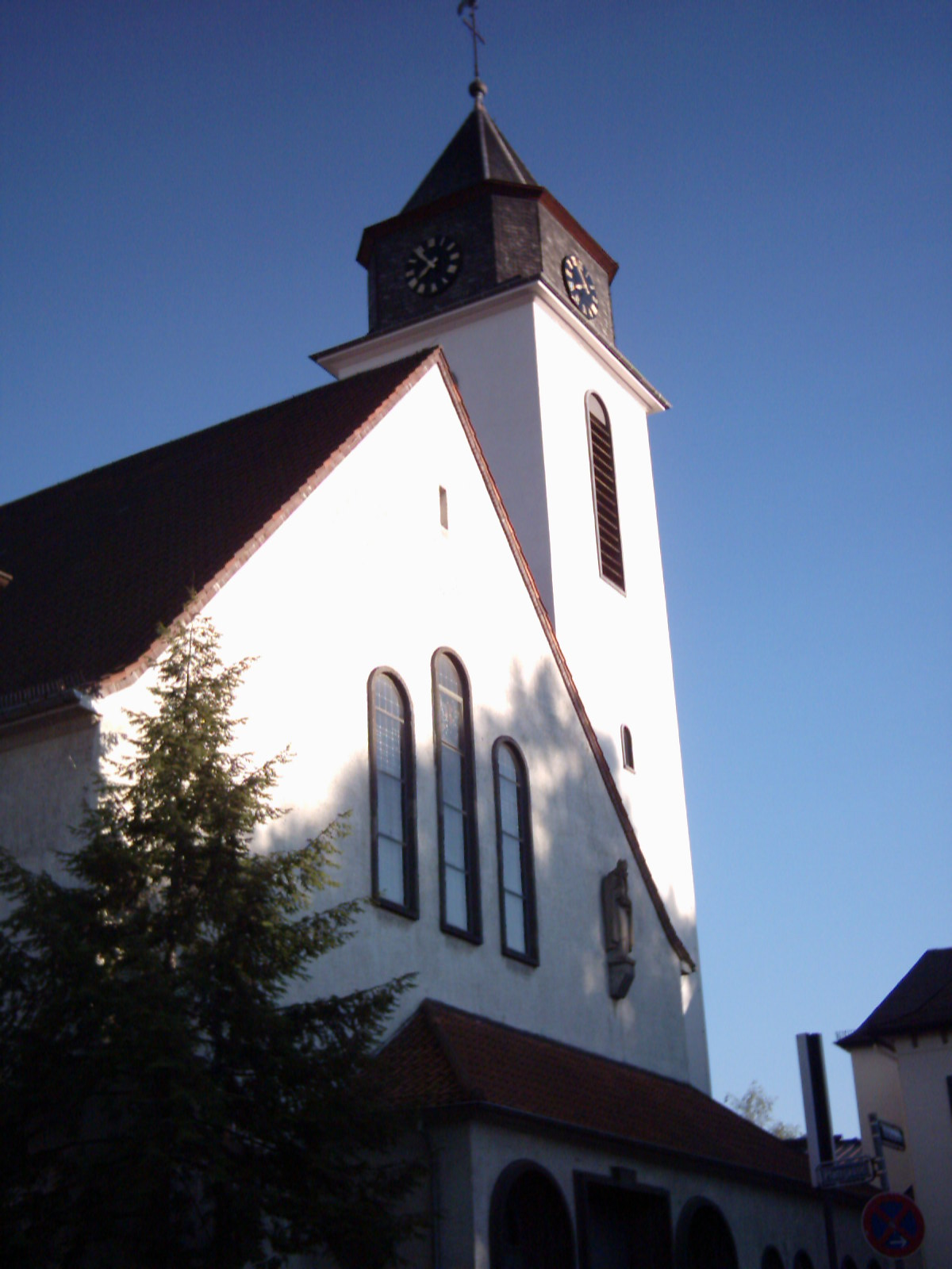 Katholische Pfarrkirche St. Nikolaus in Bieber, Rathausgasse, alter Ortskern